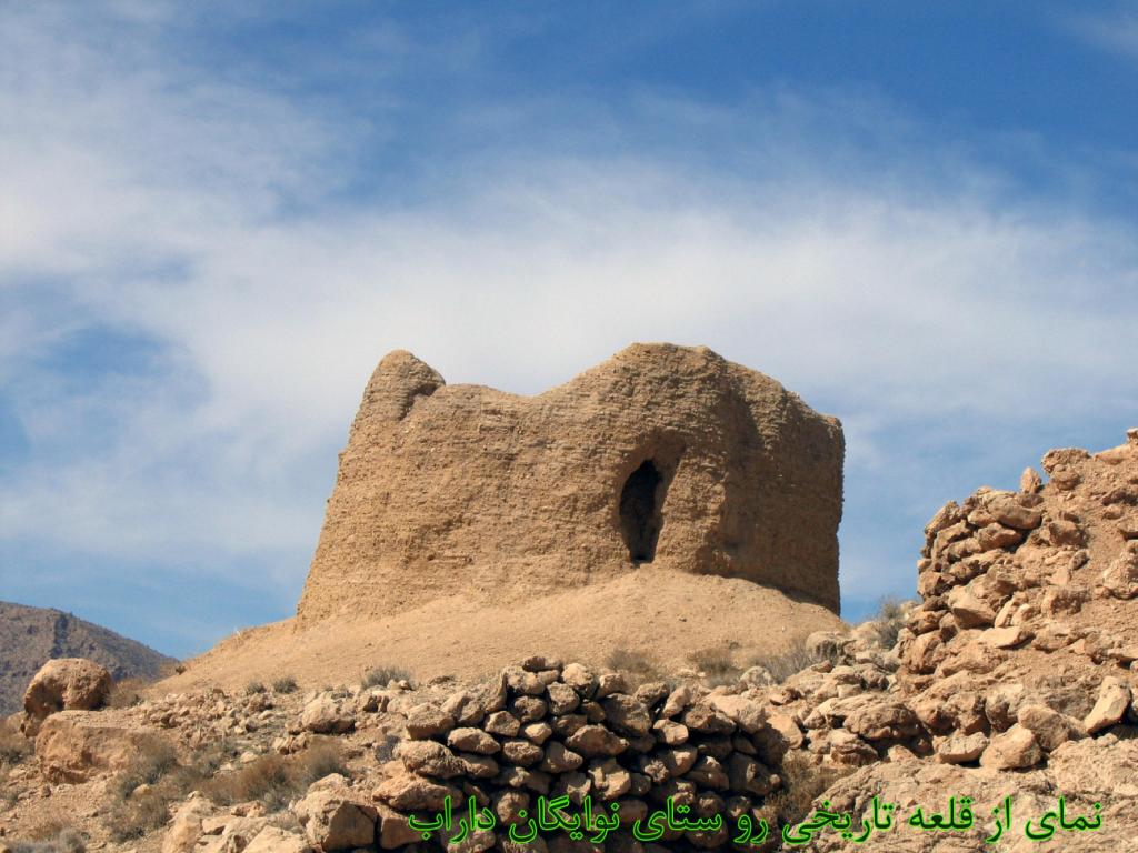 قلعه تاريخي نوايگان